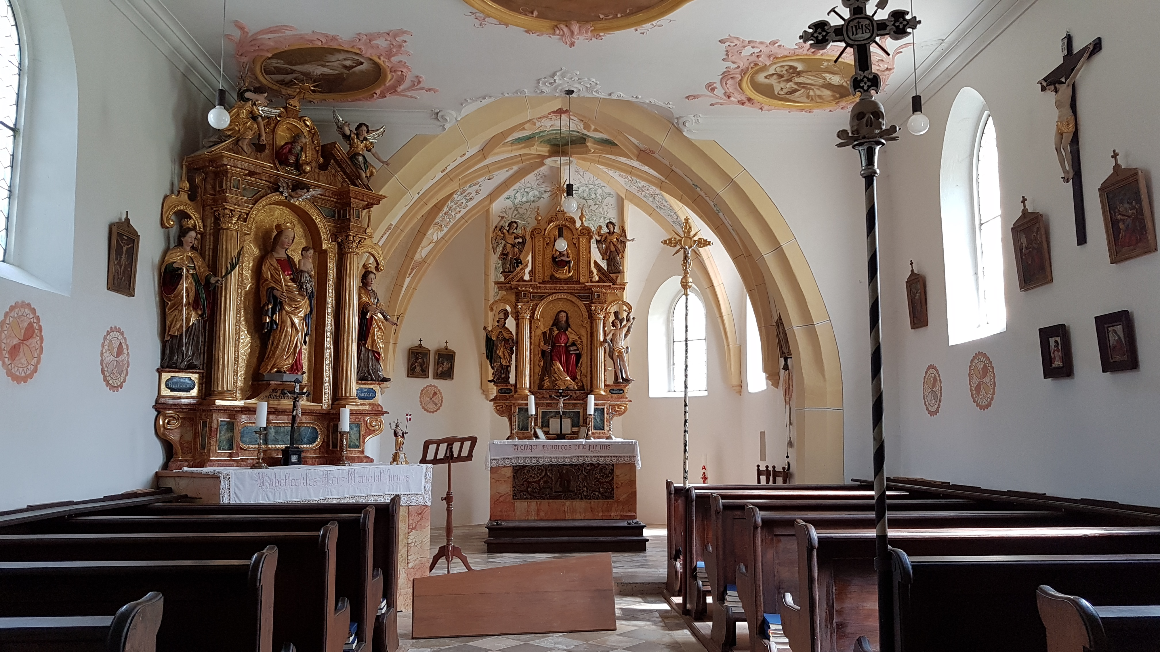 Geilertshausen (Egling), Filialkirche St. Andreas, überwiegend Früh- und Neobarock geprägter Innenraum (Altäre 1651, Langhausdecke 1912).